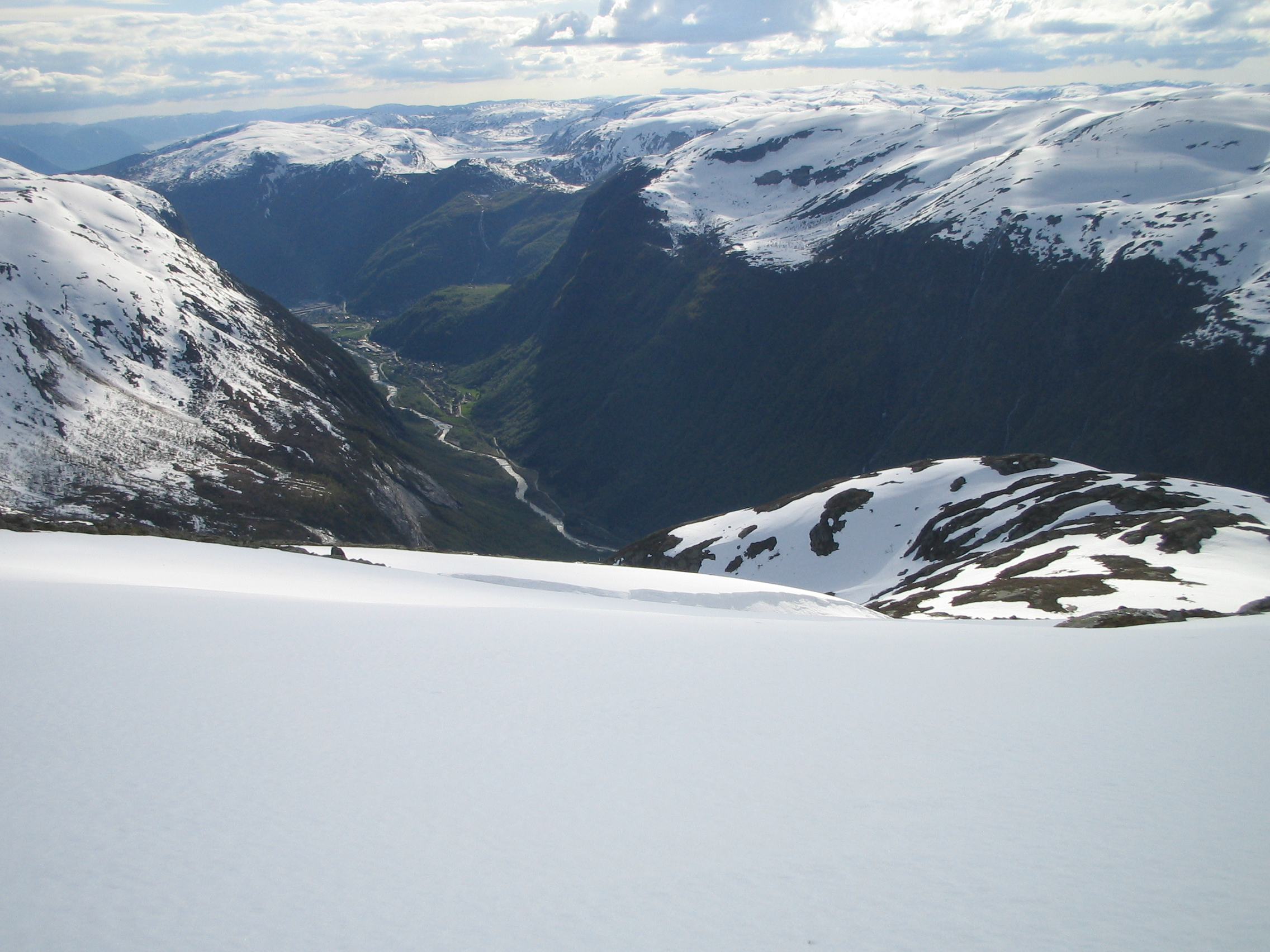 Høyanger sett fra Havren.